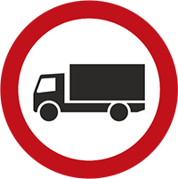 Diagramme de la signalisation routière luxembourgeoise